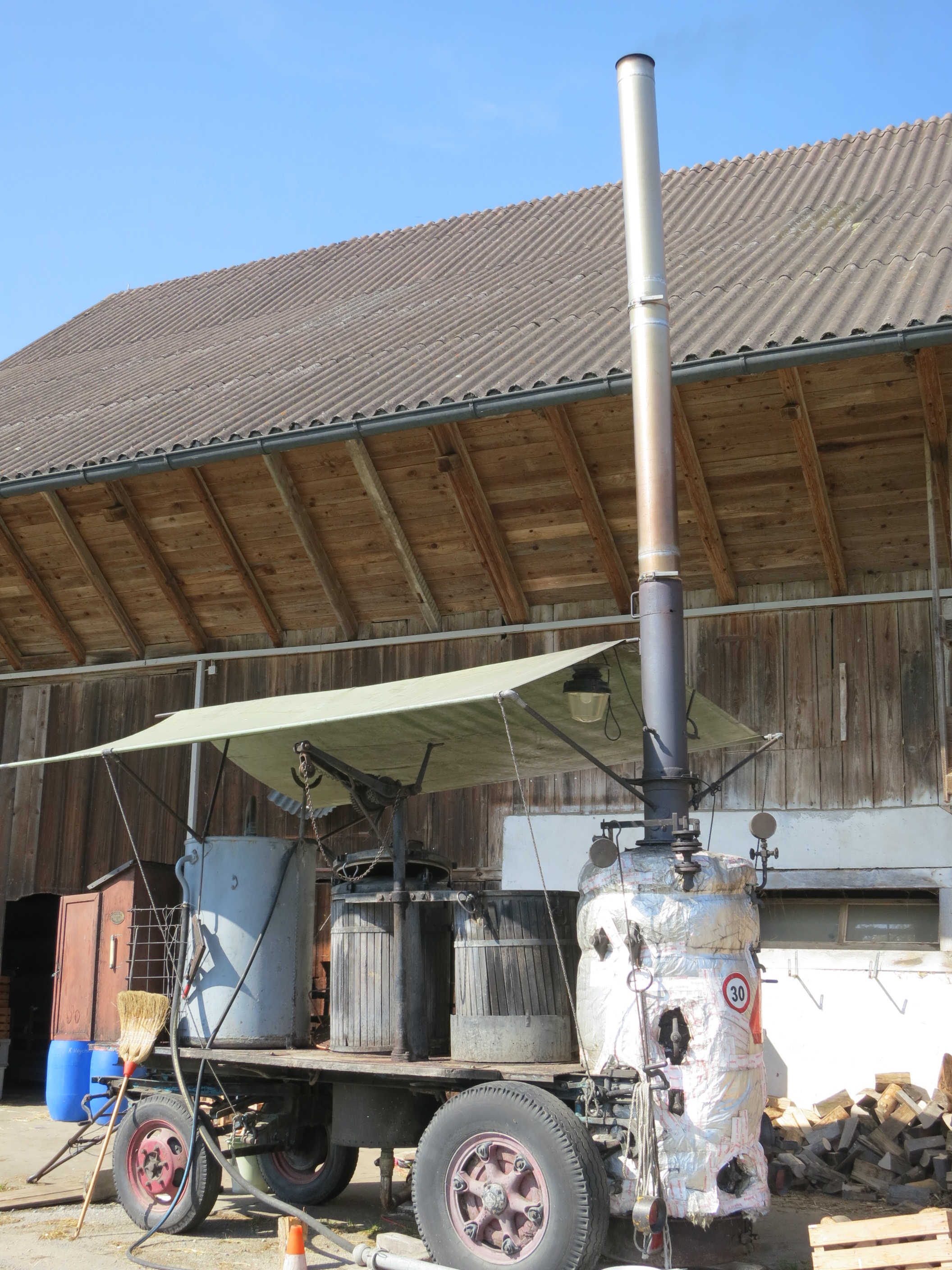 Schnapsbrennerei, Jonen AG, Schweiz